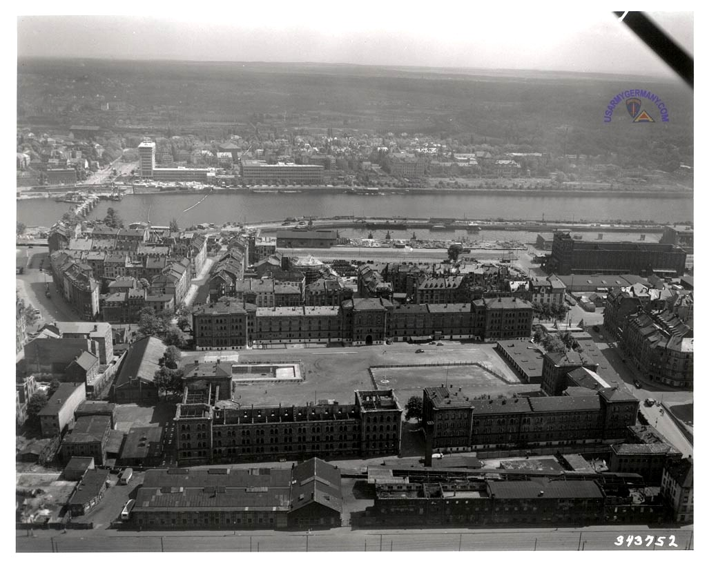 Gutleut-Kaserne in Frankfurt (InfRgt 81) Position: 50°06"09'N - 08°39"39'E